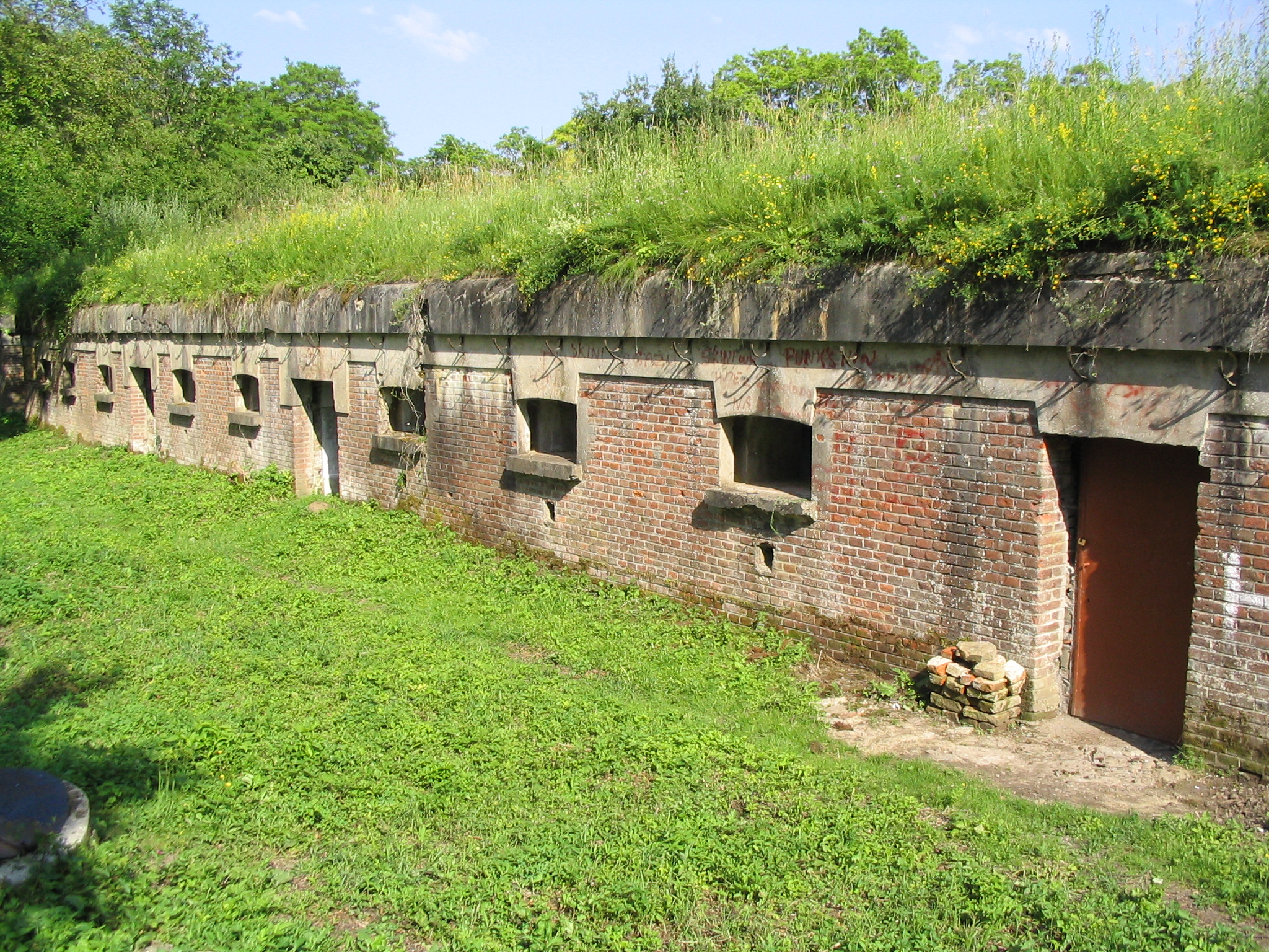 Fort III "Łuczyce" Author: Goku122